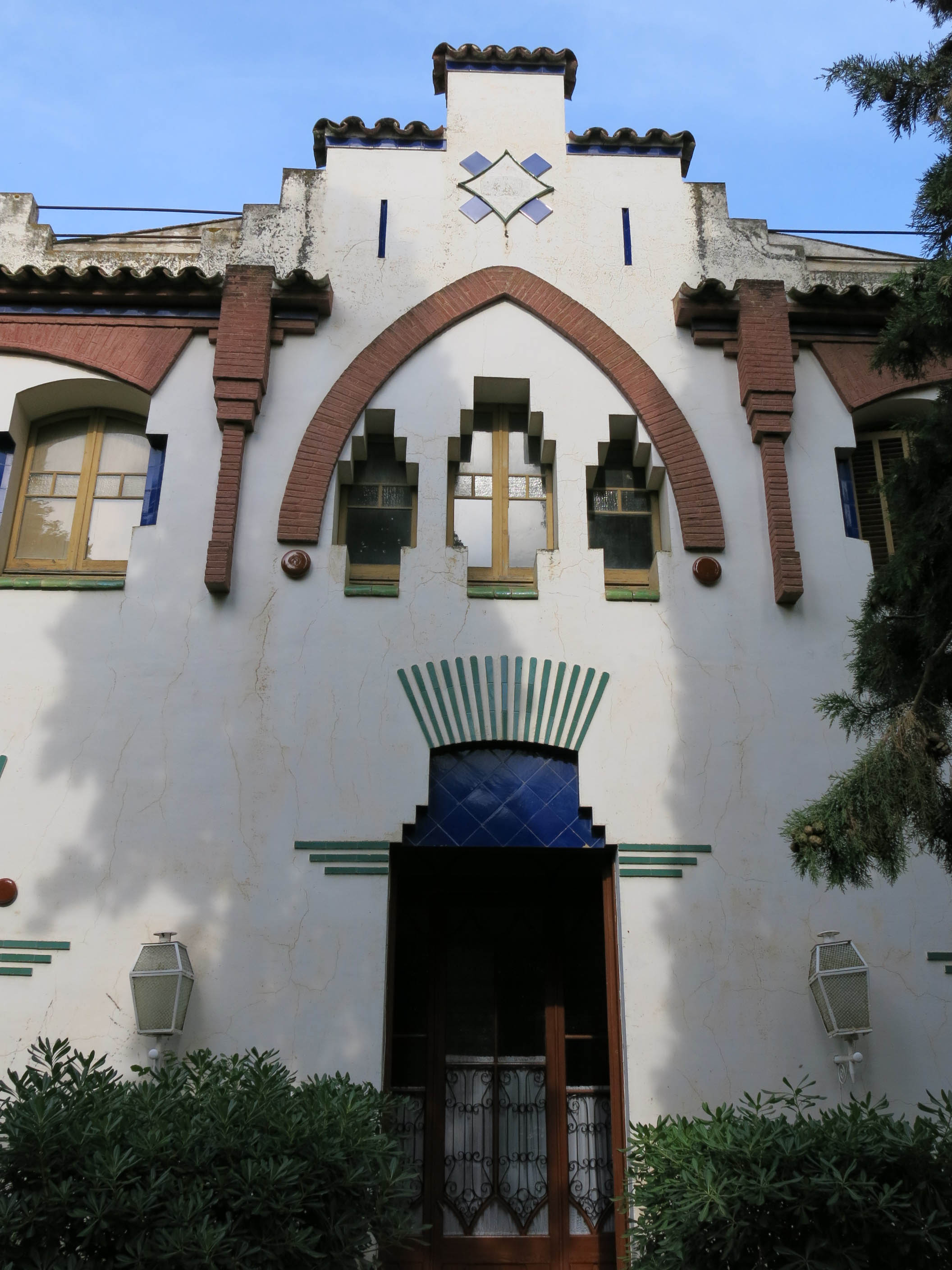 Can Carbonell (Canet de Mar)